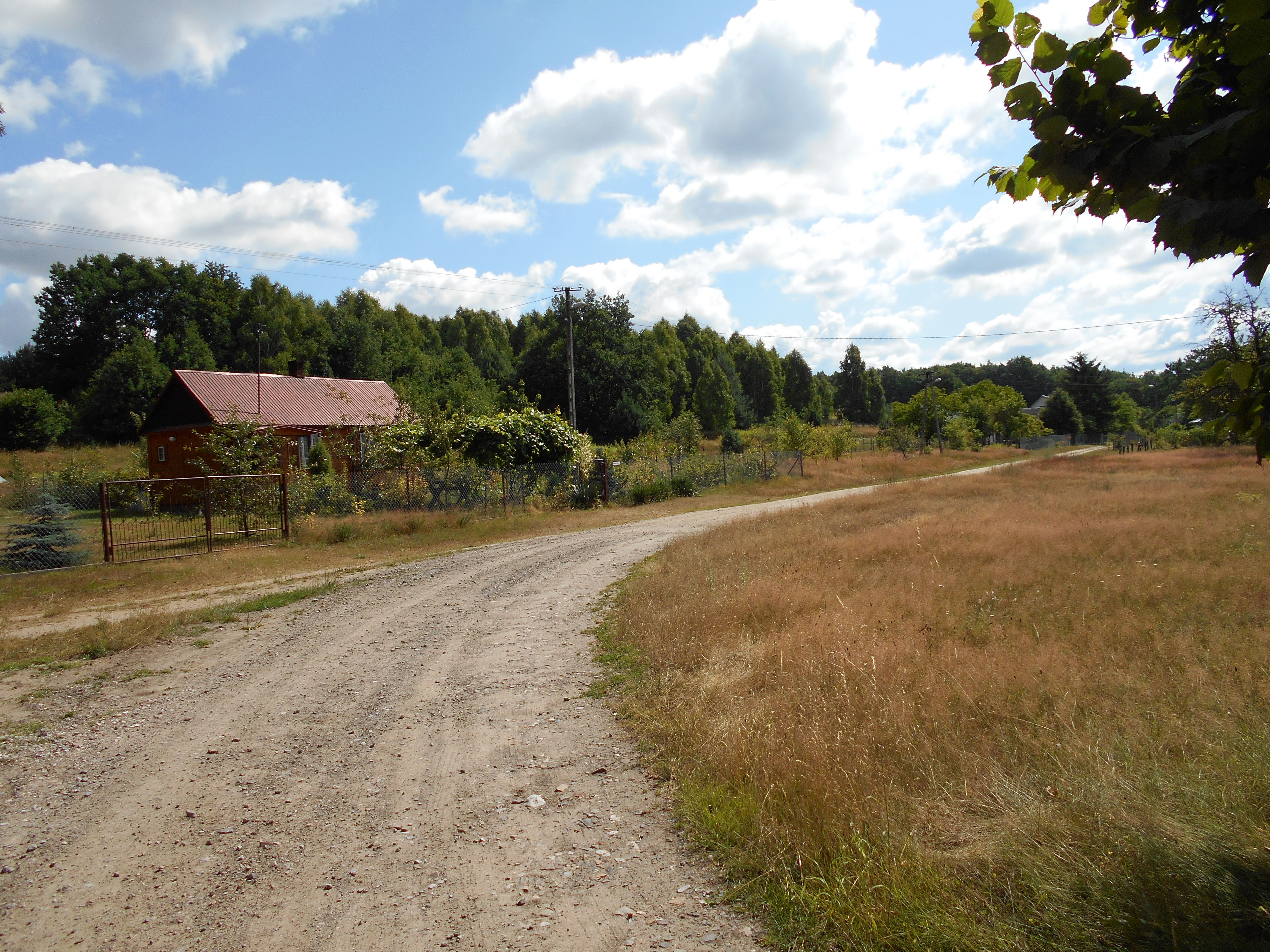 Miejscowość Krukówka w województwie lubelskim